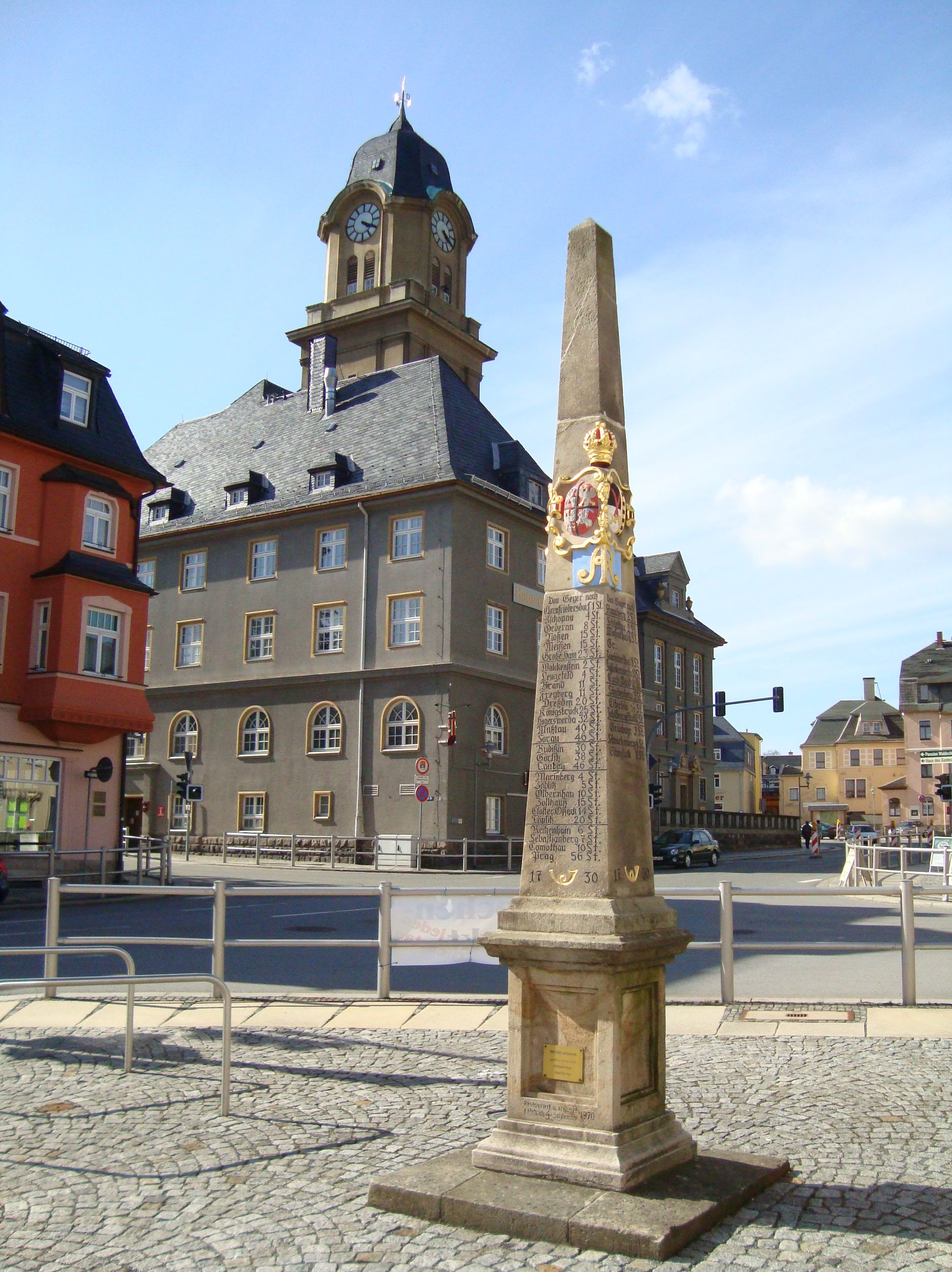 Postmeilensäule in Geyer im Erzgebirge